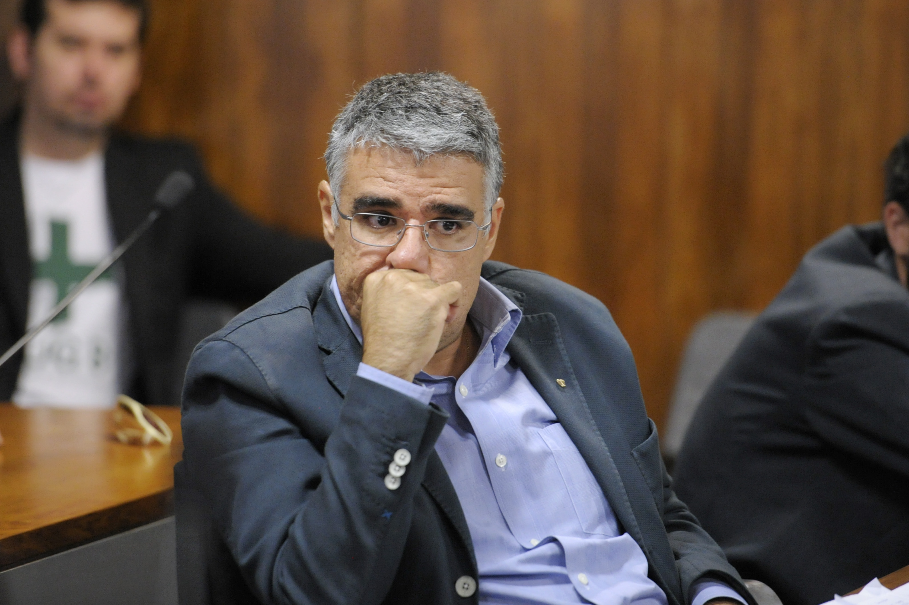 Sala de comissões do Senado durante reunião da Comissão de Direitos Humanos e Legislação Participativa (CDH). Audiência Pública Interativa para "instruir a Sugestão nº 8/2014, que trata da regulamentação do uso recreativo, medicinal ou industrial da maconha - impactos sobre a violência". À bancada, participante Luis Eduardo Girão. Foto: Edilson Rodrigues/Agência Senado